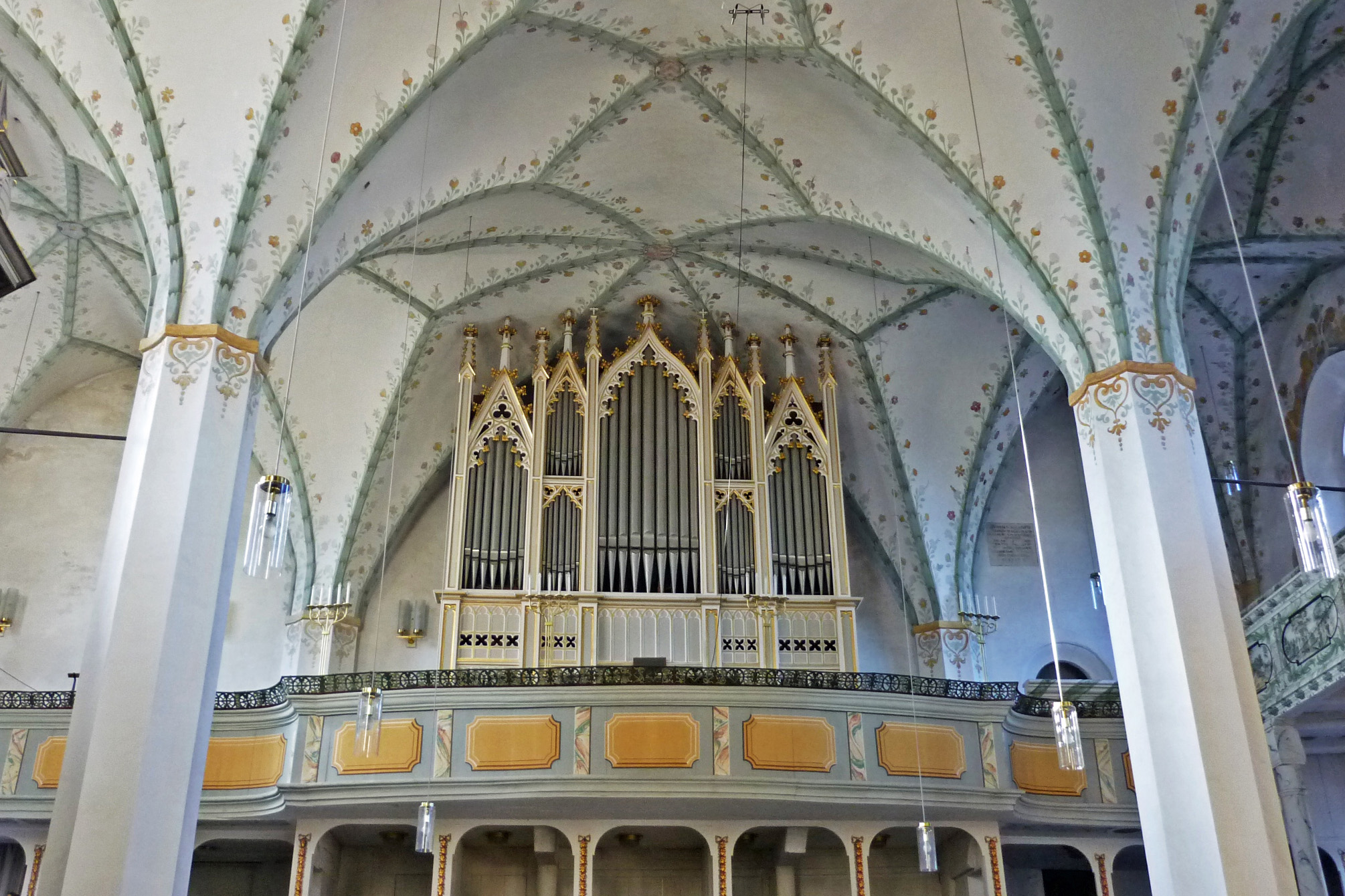 Orgelempore der Laurentiuskirche in Dippoldiswalde, Instrument von Karl Traugott Stöckel, 1864.